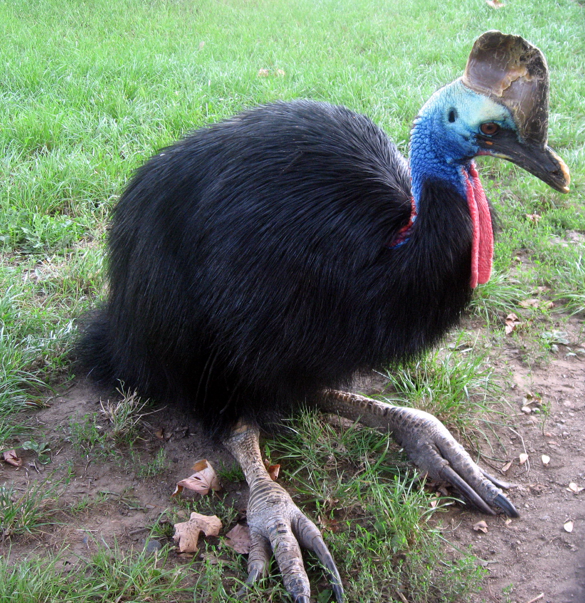 Kasuár přilbový